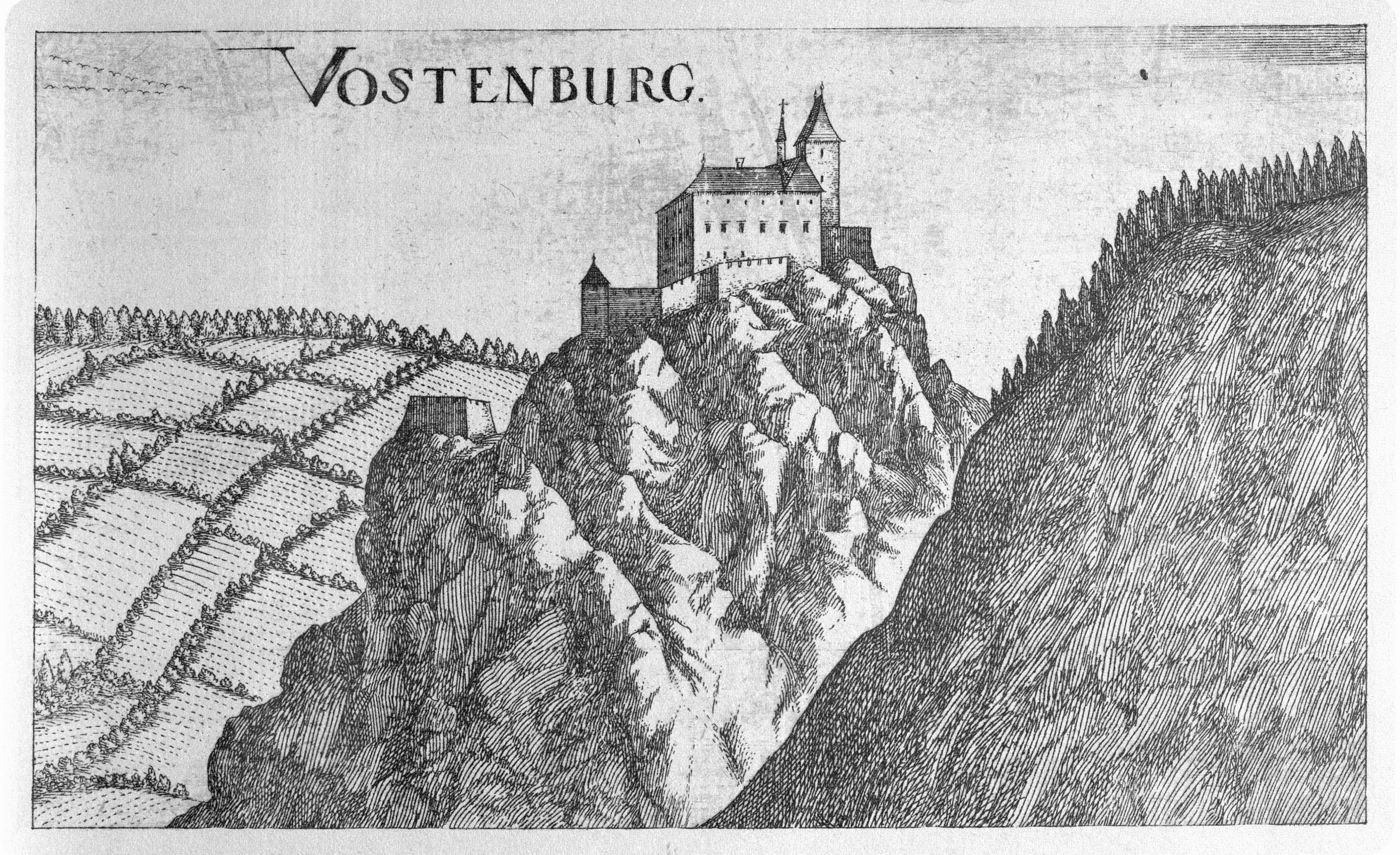 G. M. Vischers Käyserlichen Geographi, Topographia Ducatus Stiriae, Das ist: Eigentliche Delineation / und Abbildung aller Städte / Schlösser / Marcktfleck / Lustgärten / Probsteyen / Stiffter / Clöster und Kirchen / so es sich im Herzogthumb Steyrmarck befinden; Und anjetzo Umb einen billichen Preyß zu finden seynd Bey Johann Bitsch Universitäts Buchhandlern / Auff dem Juden=Platz bey der guldenen Saulen. Graz 1681 Die Nummerierung der Dateien folgt der alphabetischen Reihung der Orte